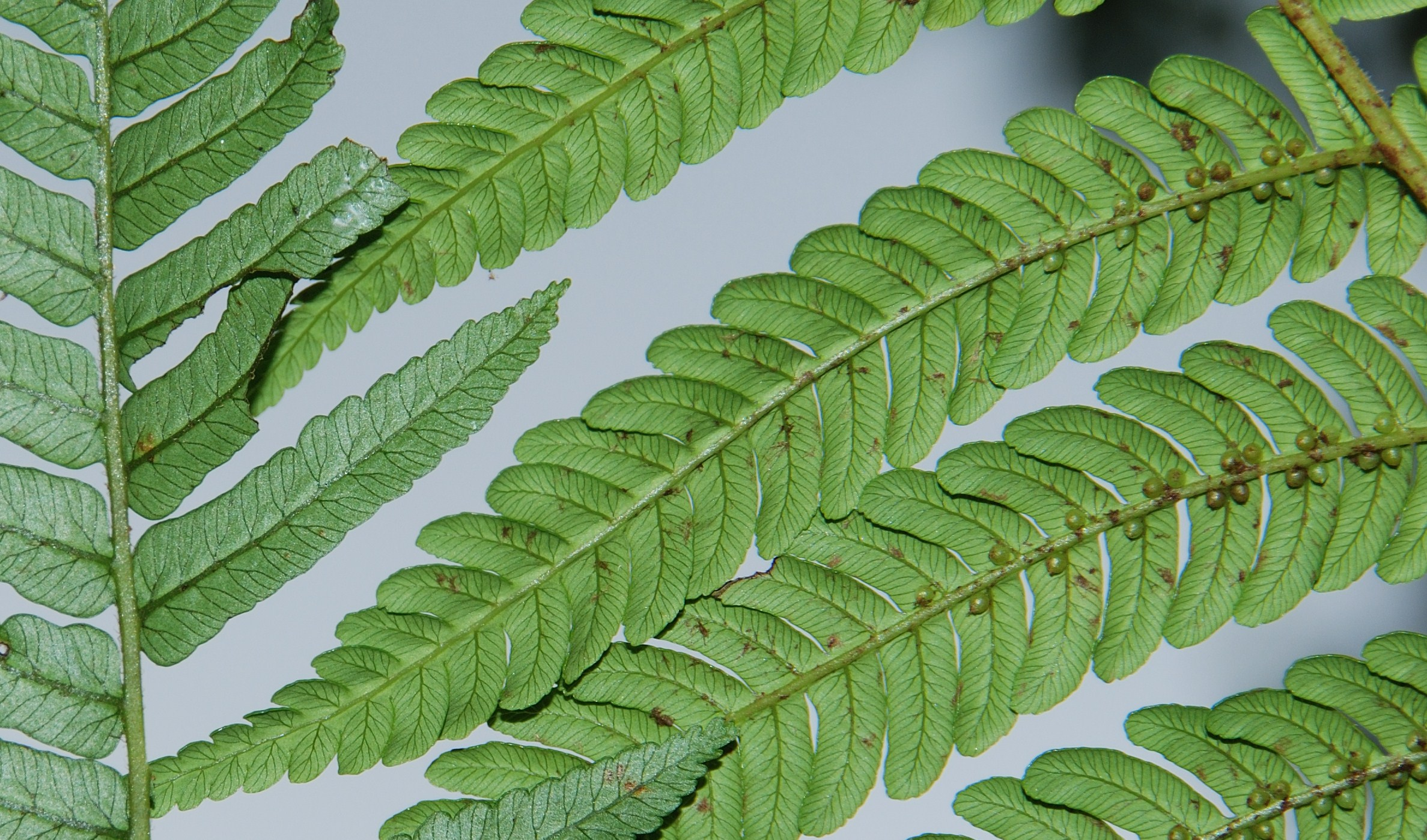 detail des feuilles bipennées du Fanjan male Cyathea borbonica)et des feuilles tripénnées des Fanjans femelles (Cyathea excelsa ou Cyathea glauca).